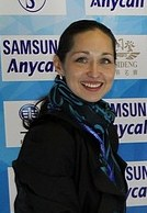 Anjelika Krylova at the Cup of China 2010